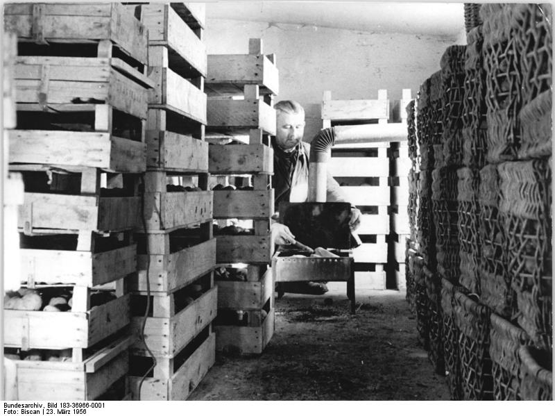 Ottersleben, Pflege von Saatkartoffeln Zentralbild Biscan Me-Th 23.31956 Meisterbauer Hartmann für die Frühjahrsbestellung vorbereitet. Meisterbauer Walter Hartmann ein werktätiger Einzelbauer in Ottersleben bei Magdeburg, hat sich auf die Frühjahrsbestellung gut vorbereitet. Das Frühkartoffel-Pflanzgut hat er zum Vorkeimen aufgestellt, vom Hafer-, Sommerwicken, Mais- und Sonnenblumen-Saatgut hat er je hundert Körner zu Keimproben benutzt, um die richtige Saatgutmenge ermitteln zu können. UBz: Blick in einen Nebenraum des Stalles, in dem Meisterbauer Hartmann sein Frühkartoffelpflanzgut zum Vorkeimen aufgestellt hat. (Im Hintergrund) Koll. Hartmann beim Beschicken der kleinen Grude, die den Raum gleichmässig warm hält. Hartmann rechnet damit, die Frühkartoffeln in drei bis vier Wochen auspflanzen zu können.